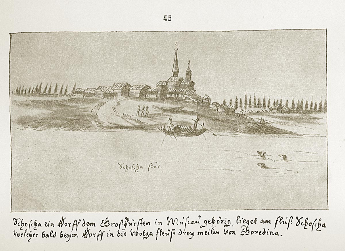 Деревня Шоша на одноимённой реке